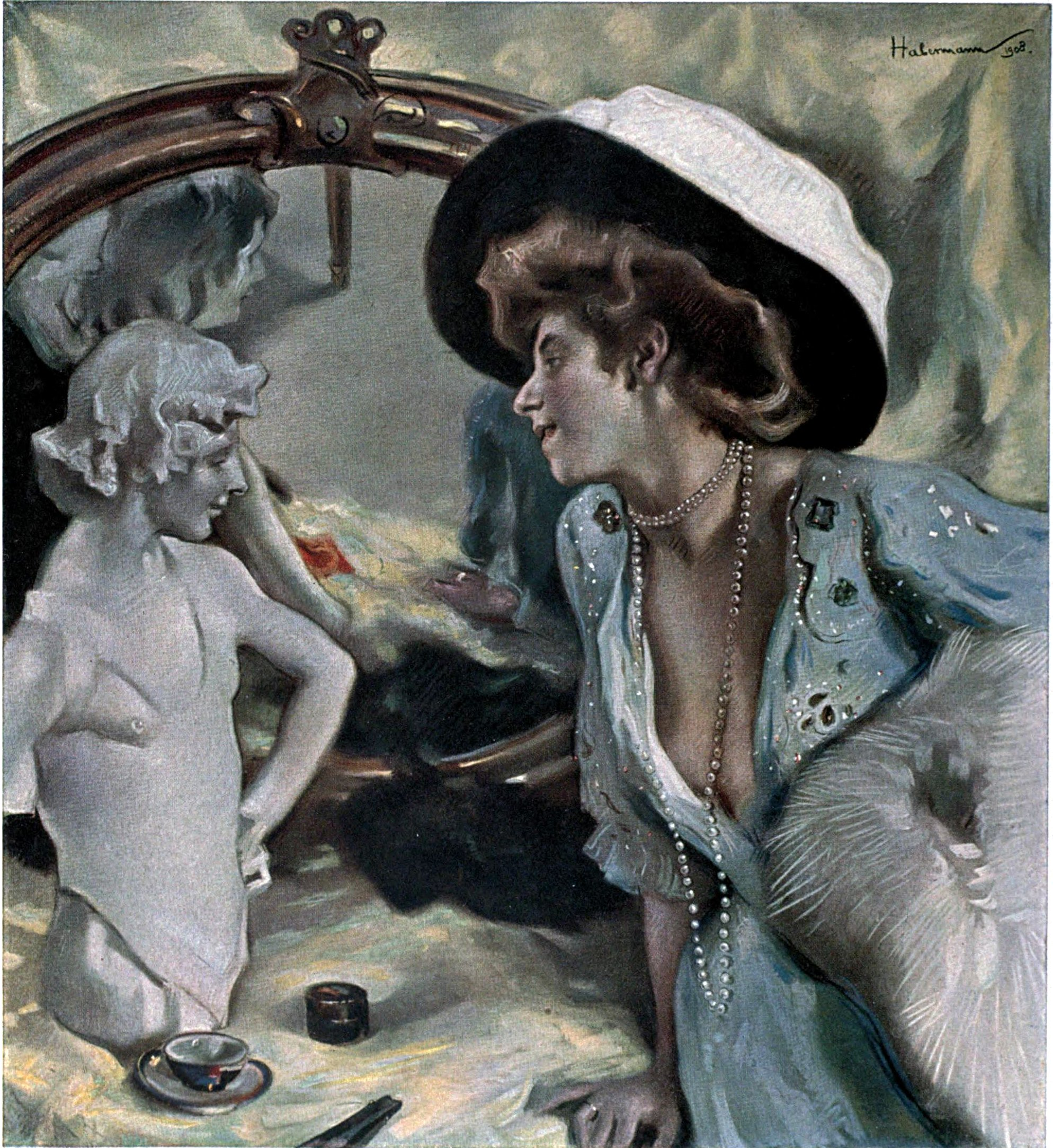 Bildnis (Pastell)